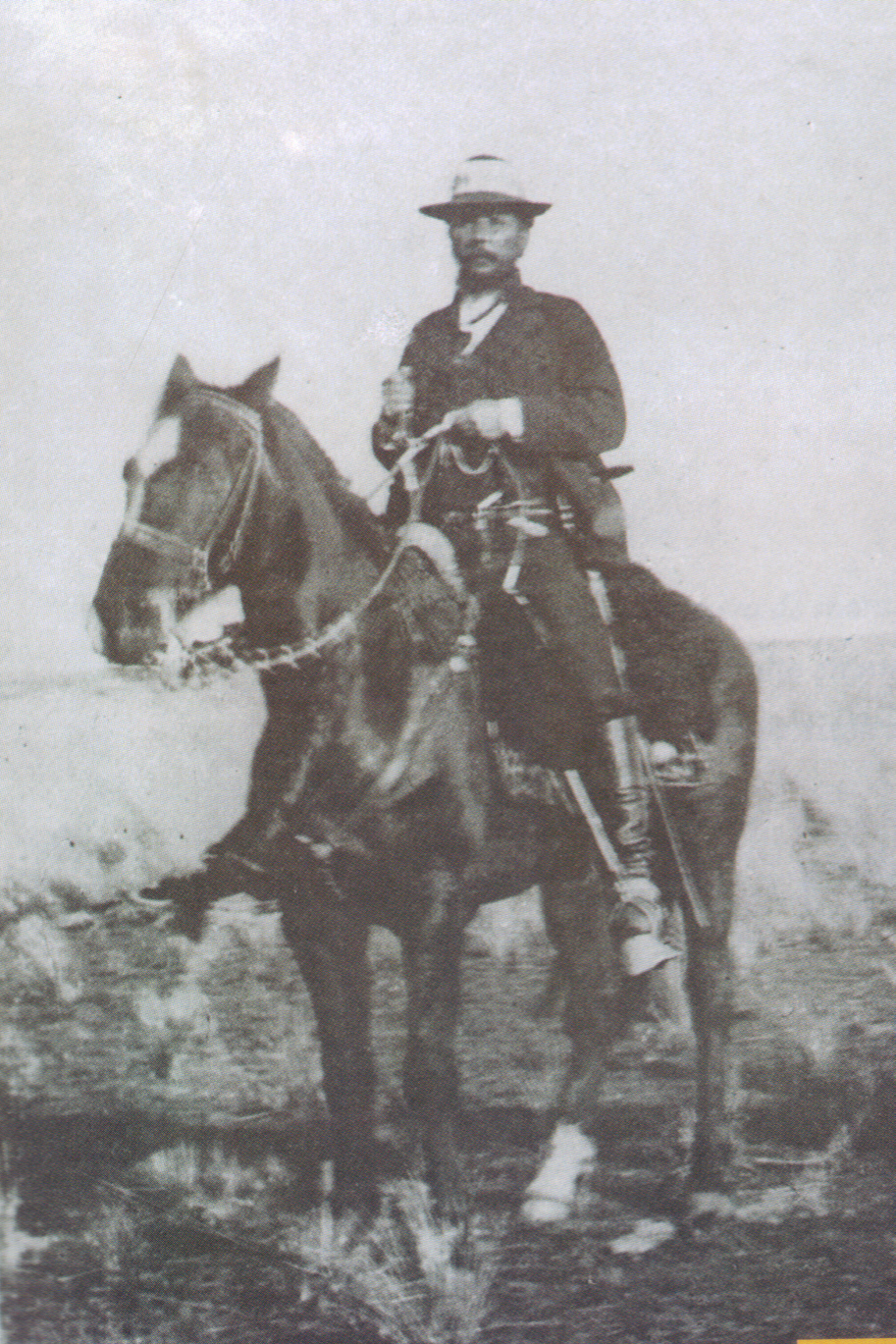 Fotografía ecuestre de Aparicio Saravia (1856 – 1904), político, militar uruguayo.